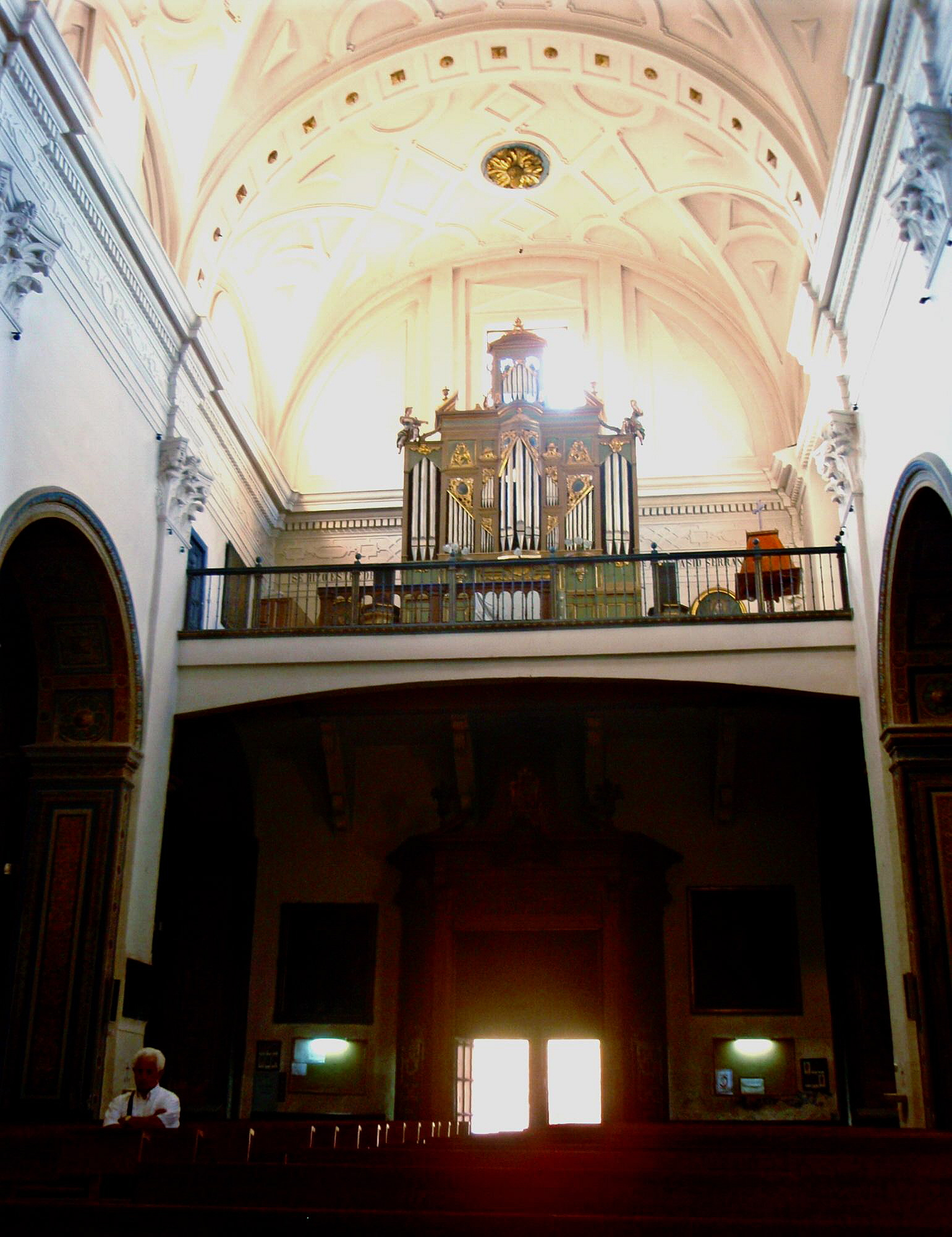 Vista hacia los pies, mostrando el coro y el órgano (1919, reutilizando la fachada barroca del anterior) de la iglesia de San Miguel y San Julián, en Valladolid, España